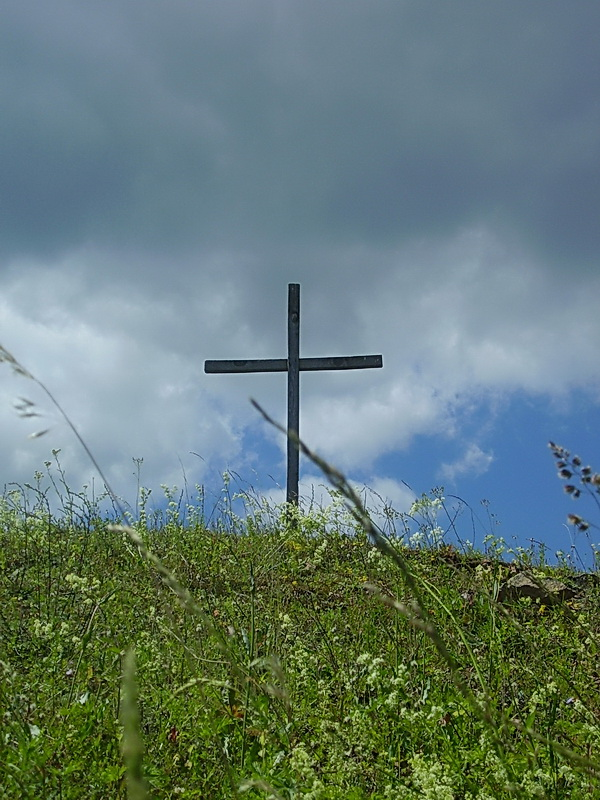 Гайна. Месца касцёла